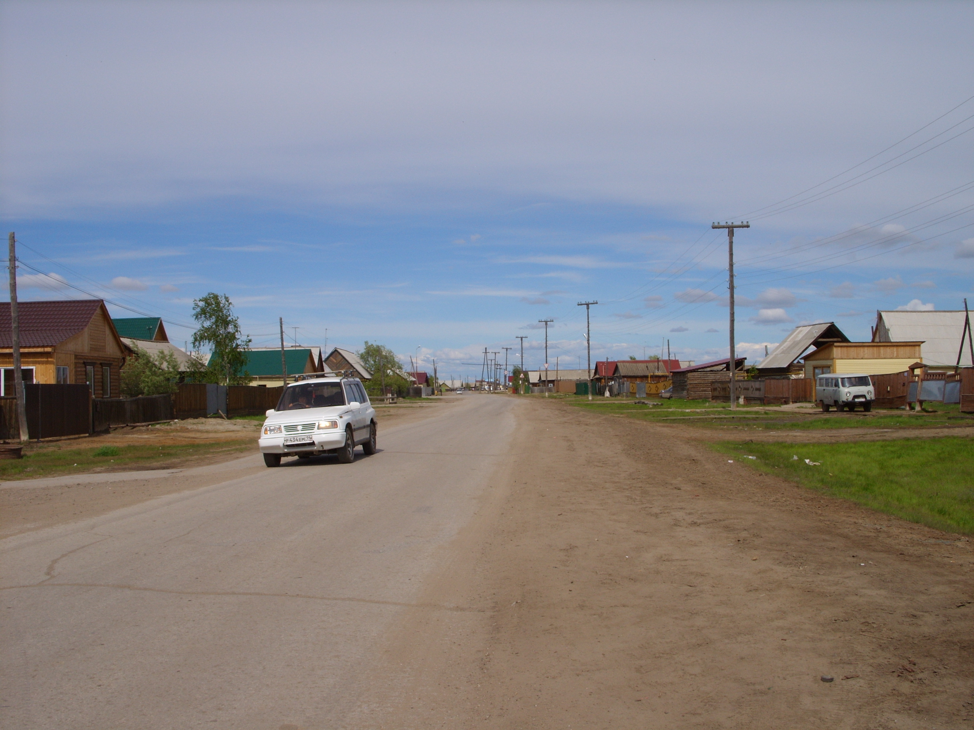 Село Хатассы, городской округ Якутск, Республика Саха (Якутия), Россия